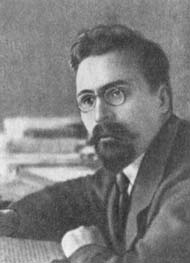 Lev Mikhailovich Karakhan (Лев Михайлович Карахан), Soviet Diplomat (b.1889-d.1937)